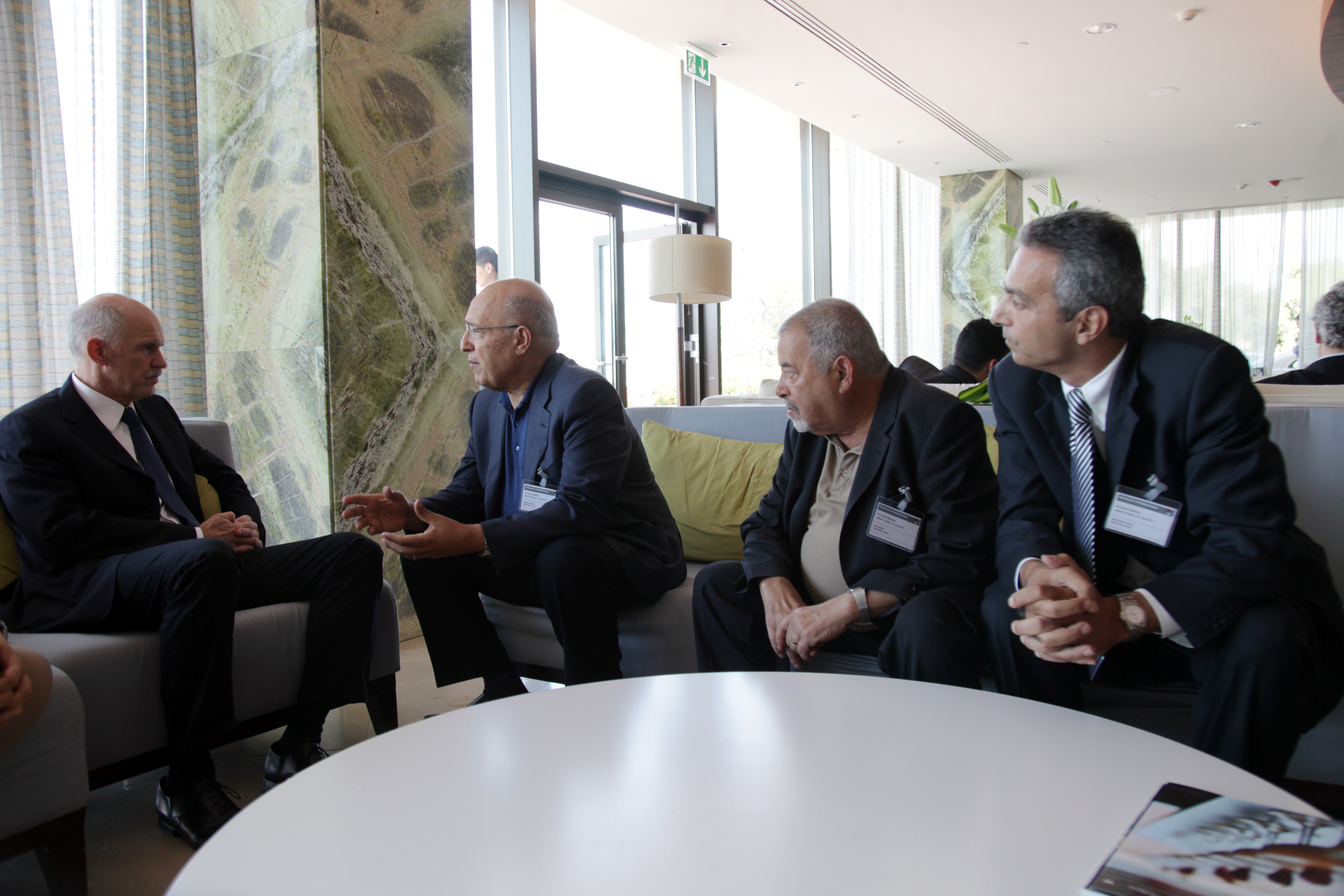 Συνάντηση με τους Παλαιστίνιους, Nabeel Shaath, Μέλος της Κεντρικής Επιτροπής της Φατάχ και Υπεύθυνο Εξωτερικών Σχέσεων, τον Ilan Halevi και τον Moustafa Ajouz (Συμβούλιο Σοσιαλιστικής Διεθνούς) Ξενοδοχείο "Astir Palace", Βουλιαγμένη 2 Ιουλίου, 2011